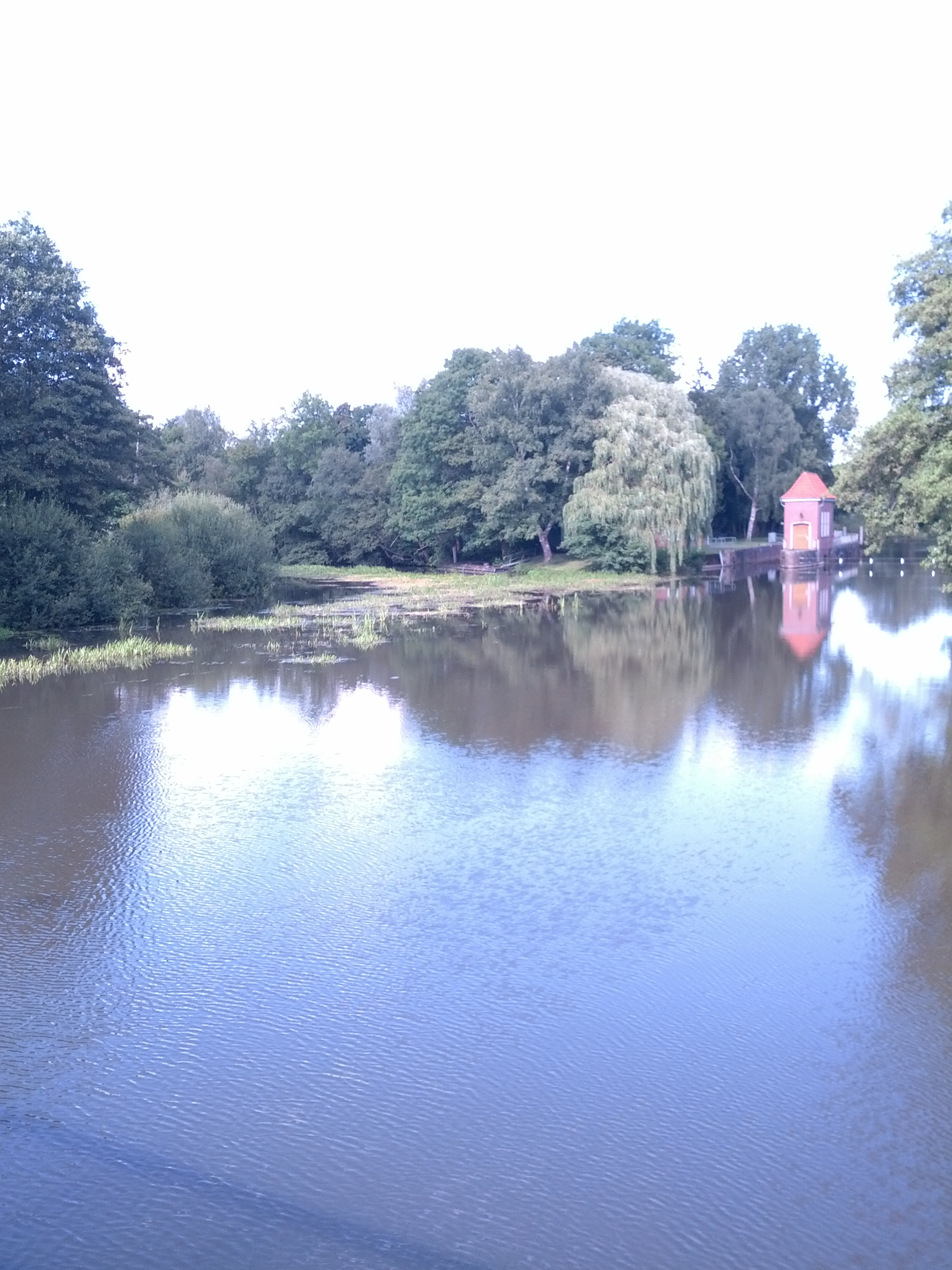 Wehr in de Oost in Bremervöör